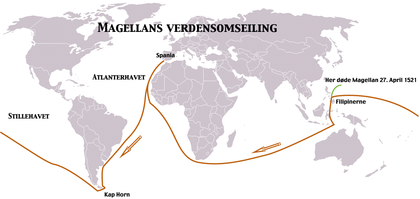 Ferdinand Magellans verdensomseiling. Map of Megallans vogage, translated into Norwegian (bokmål)